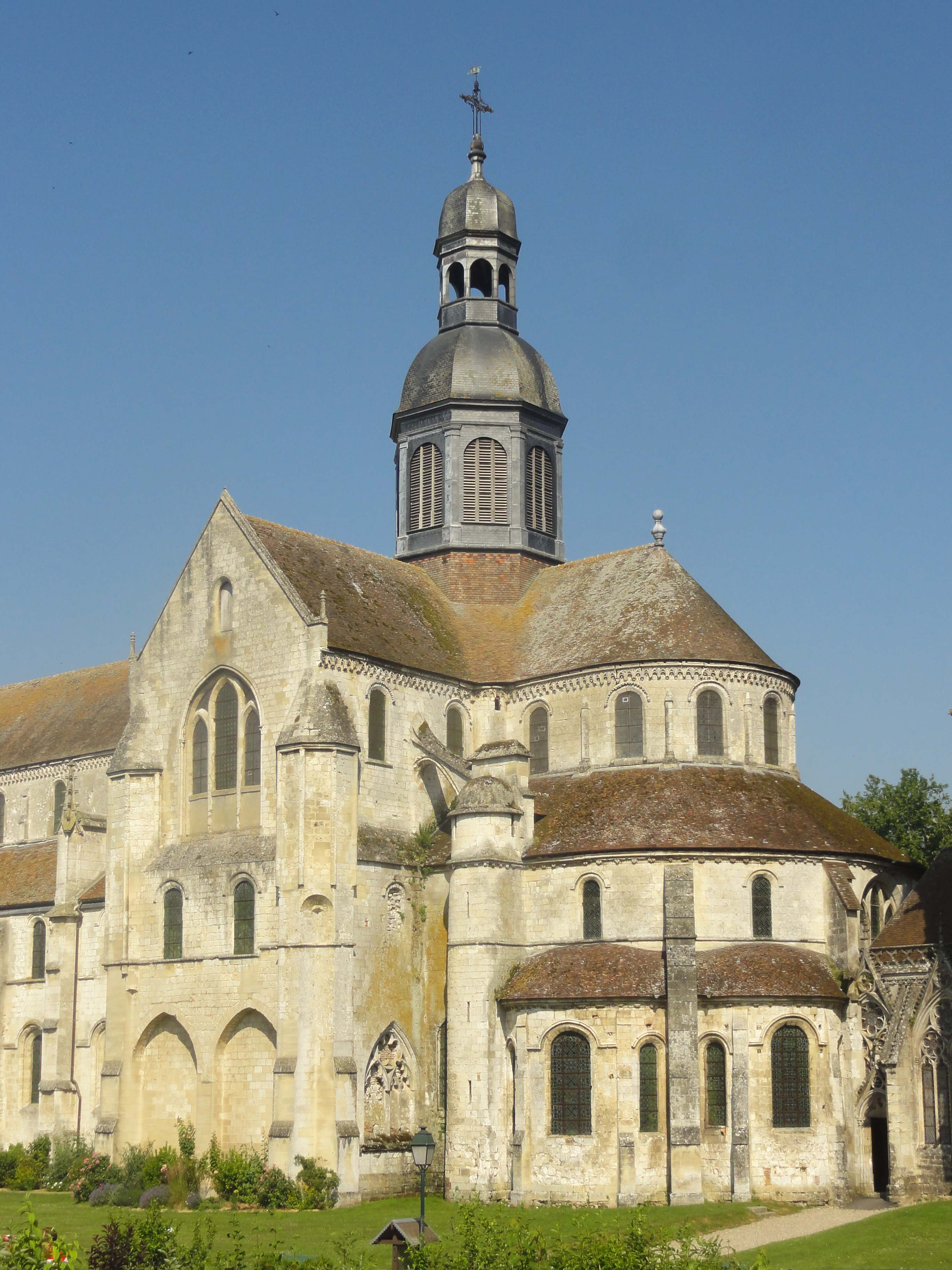 Église abbatiale Saint-Germer de l'ancienne abbaye Saint-Germer-de-Fly - voir le titre du fichier.